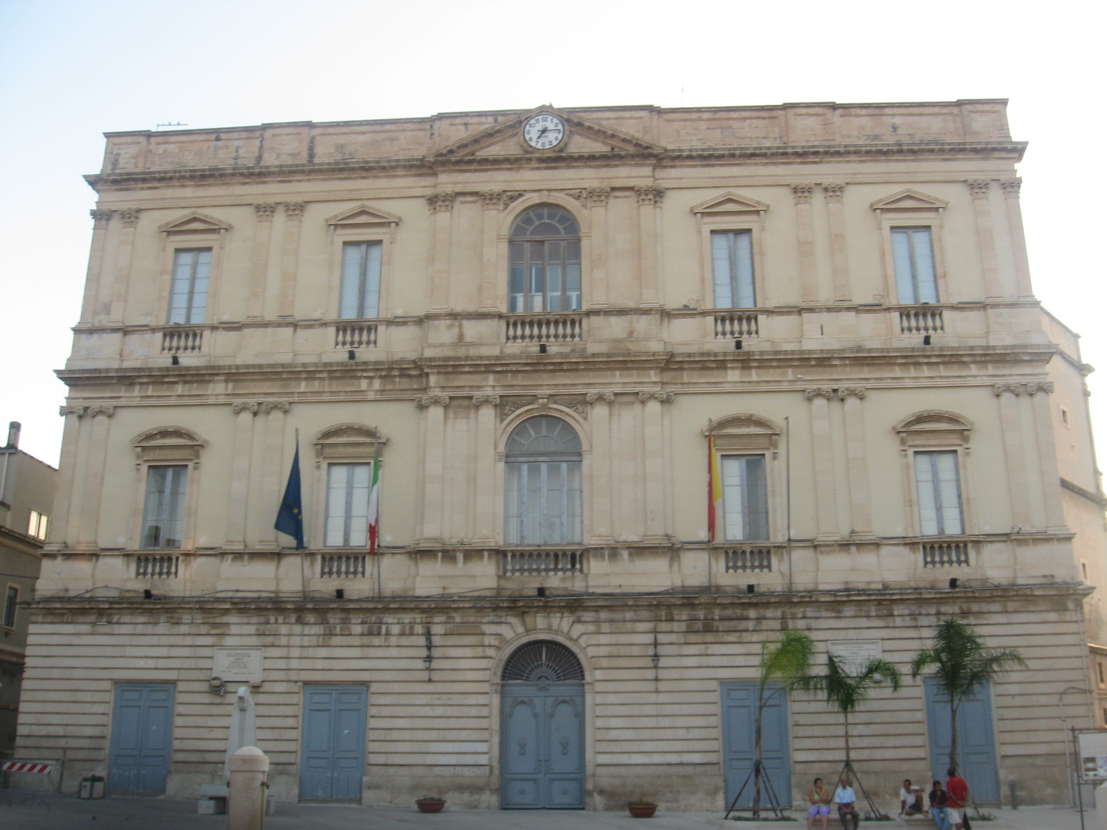 Comune_di_Comis